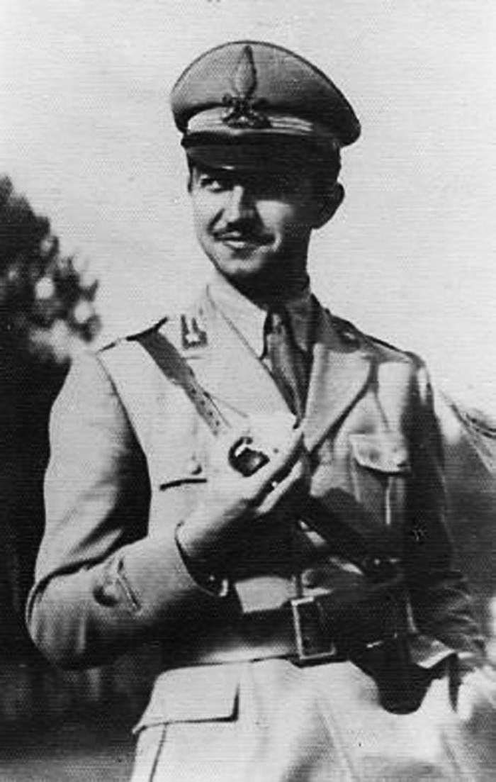 Alfredo Di Dio, comandante della Divisione Fiamme Verdi "Valtoce" nella repubblica dell'Ossola qui con la divisa del 1° Reggimento fanteria corazzata